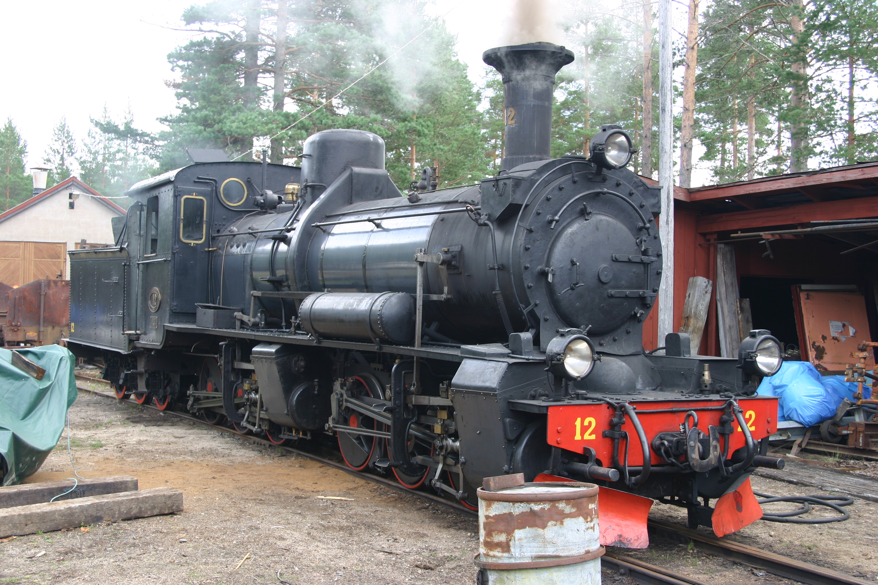 Ångloket DONJ 12 i Jädraås 09.08.08